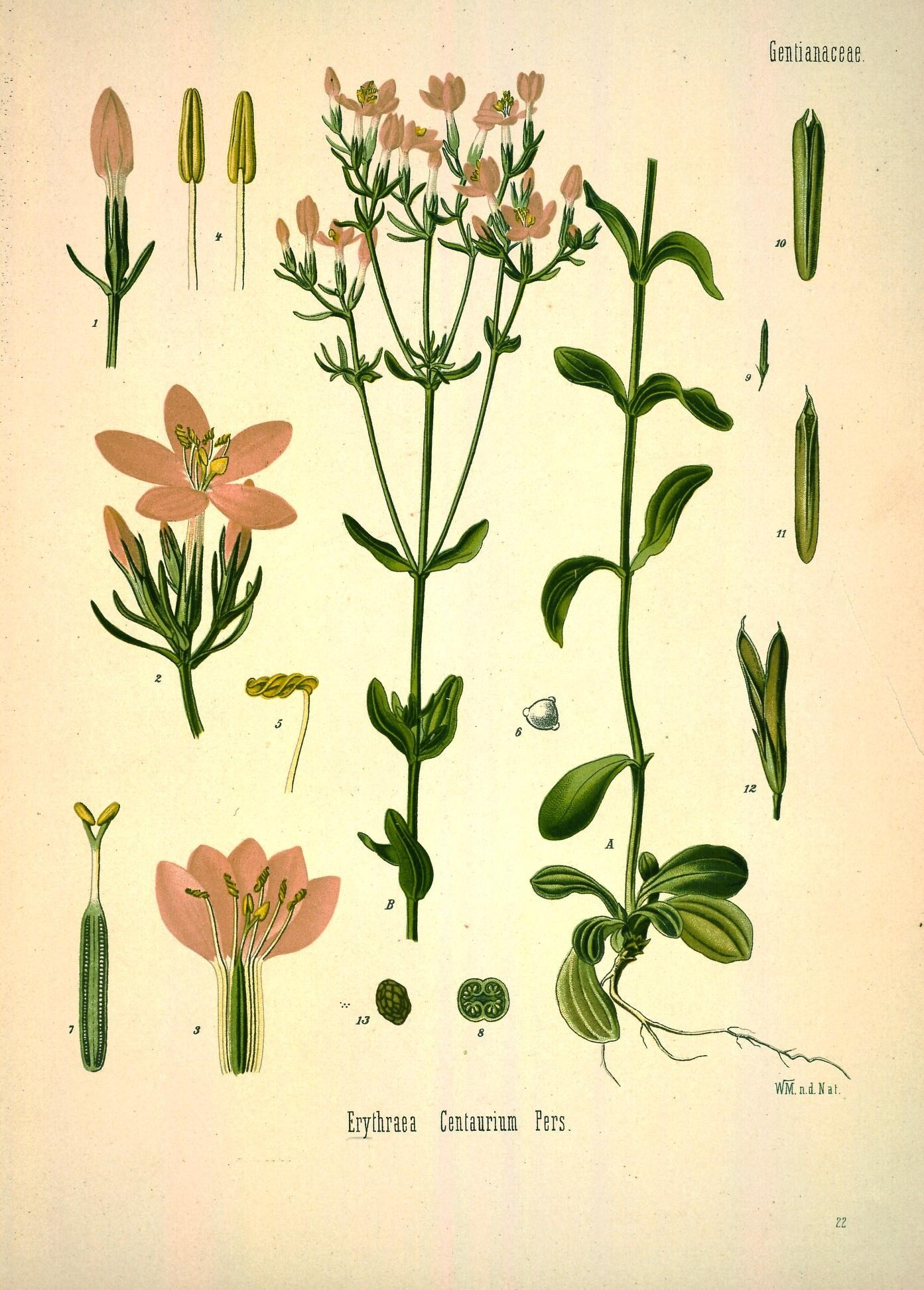 Tausendgüldenkraut. A B Pflanze in natürl. Grösse; 1 Blüthe, vergrössert; 2 Blüthenzweig, desgl.; 3 auseinandergelegte Blüthe, desgl.; 4 Staubgefässe, desgl.; 5 Staubgefäss nach dem Verstäuben, desgl.; 6 Pollen, desgl.; 7 Stempel, desgl.; 8 Fruchtknoten im Querschnitt, desgl.; 9 Frucht, natürl. Grösse; 10 u. 11 geöffnete Kapsel, vergrössert; 12 dieselbe mit Kelch, desgl.; 13 Same, desgl.